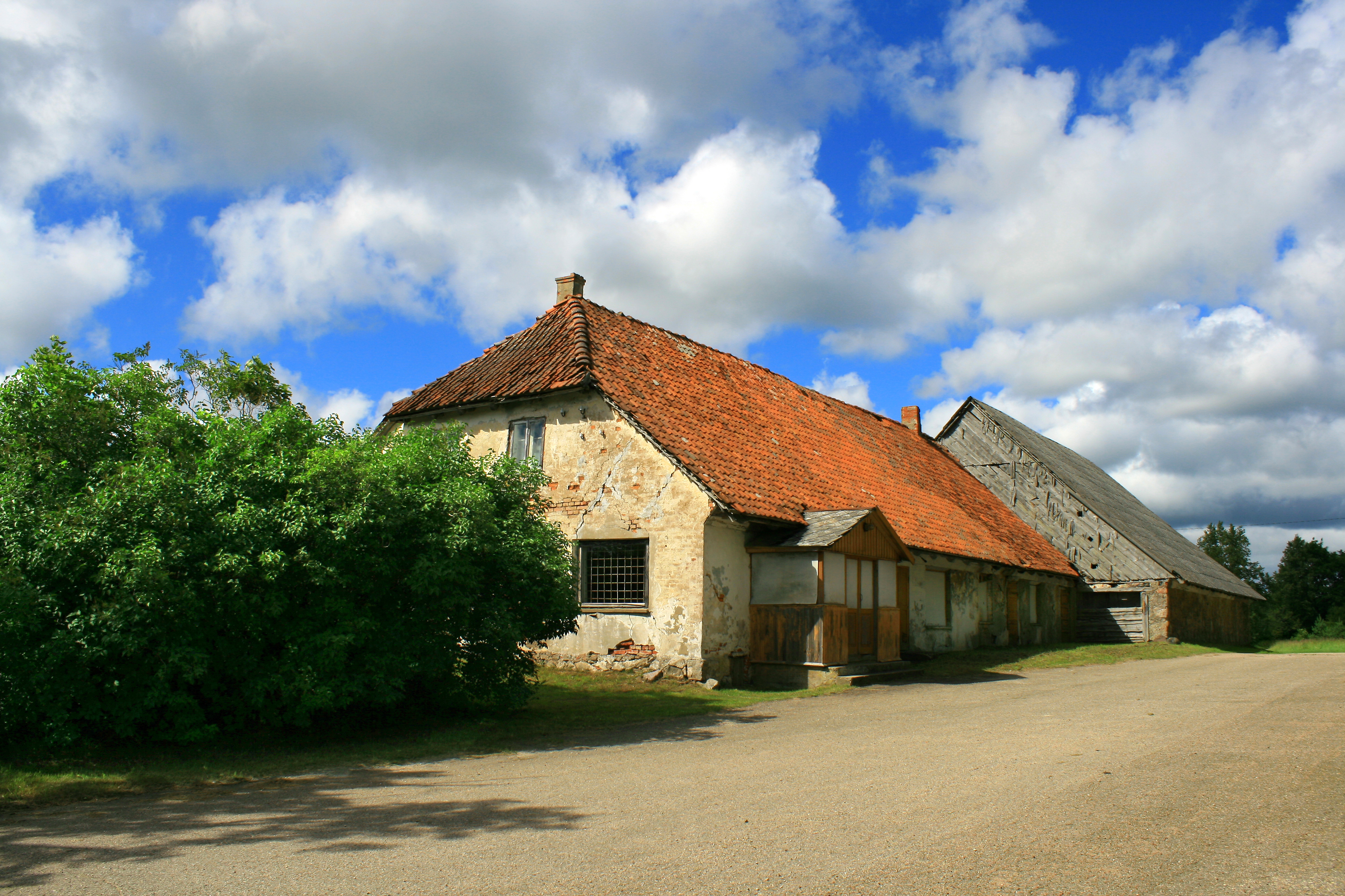 Vērgale